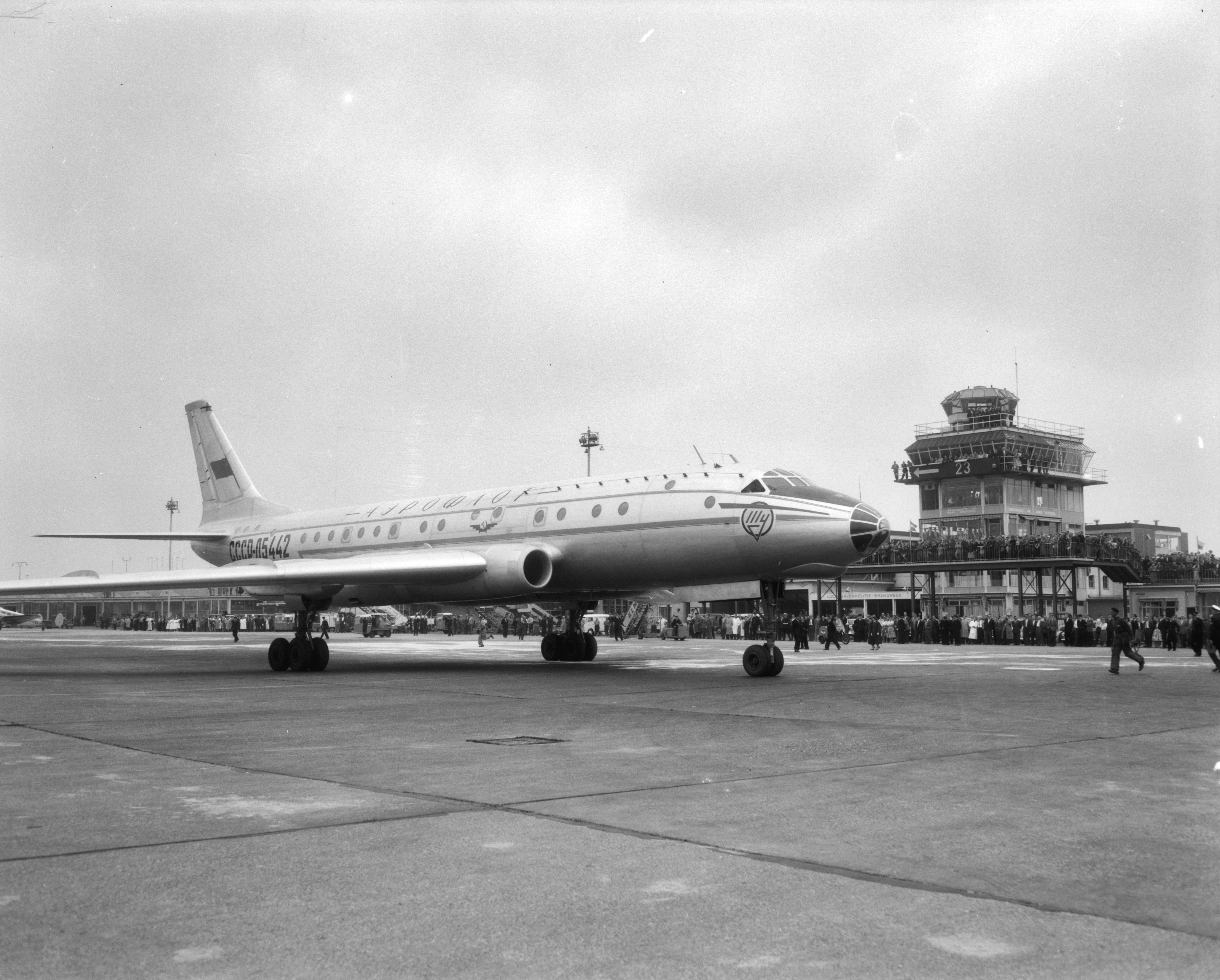 Collectie / Archief : Fotocollectie Anefo Reportage / Serie : [ onbekend ] Beschrijving : Aankomst Russisch straalvliegtuig op Schiphol Datum : 7 juli 1958 Trefwoorden : vliegtuigen Fotograaf : Pot, Harry / Anefo Auteursrechthebbende : Nationaal Archief Materiaalsoort : Negatief (zwart/wit) Nummer archiefinventaris : bekijk toegang 2.24.01.04 Bestanddeelnummer : 909-6959